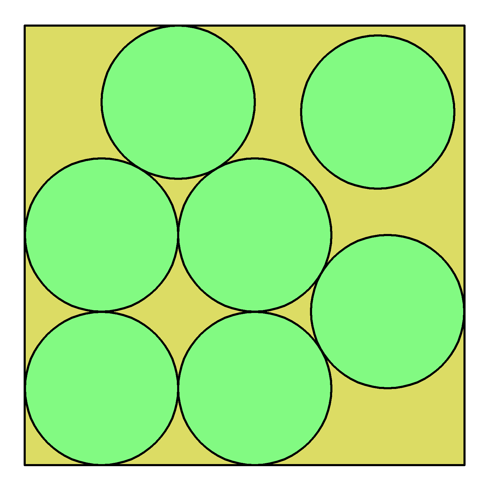 7 cirkloj en kvadrato